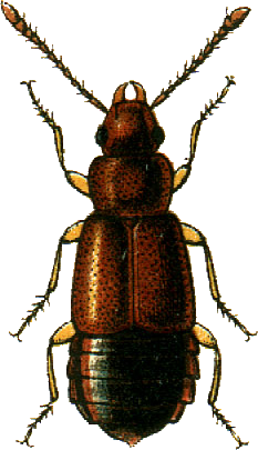 This file has been extracted from another file: Jacobs15.jpg